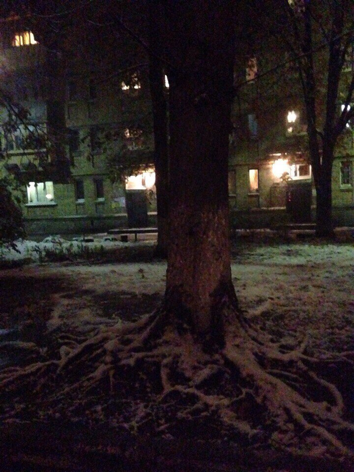 Дерево